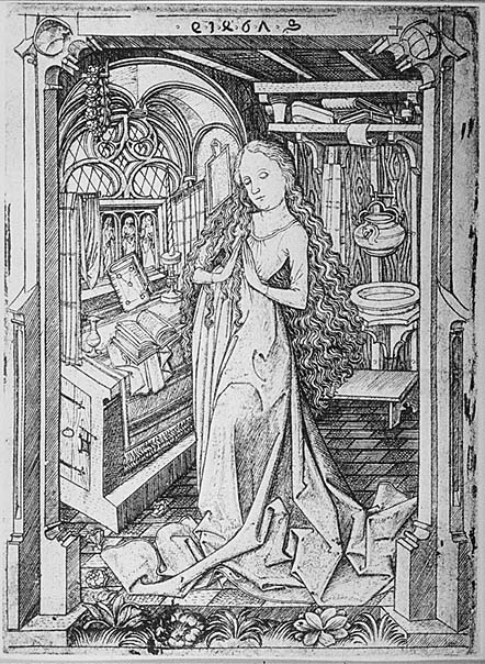 Virgin in Prayer, Engraving, Die heilige Jungfrau betet in ihrem Gemach, L.61